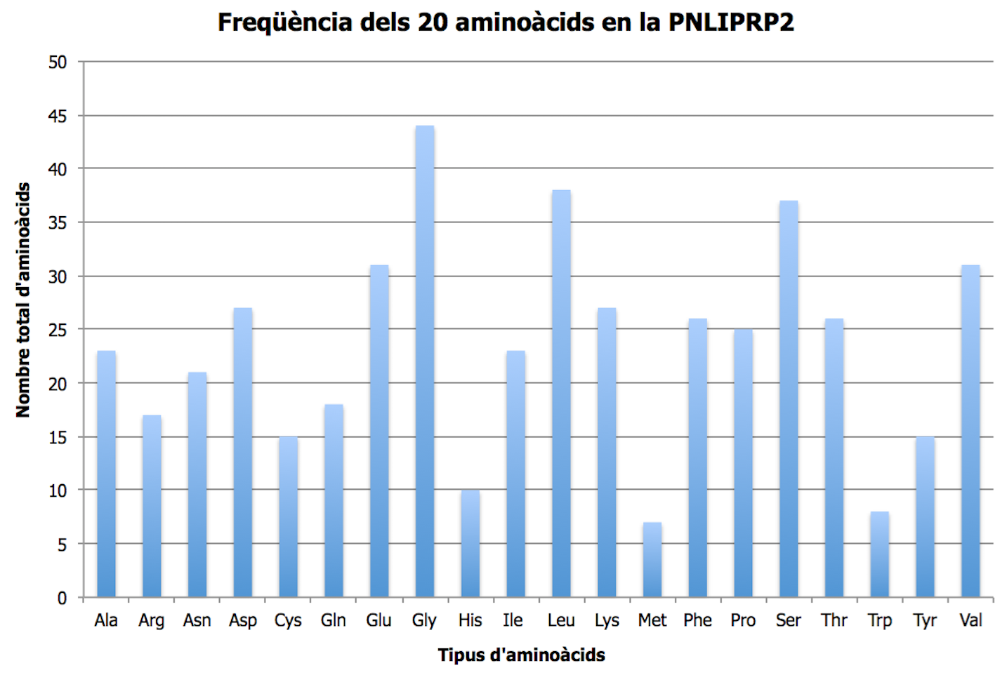 PNLIPRP2